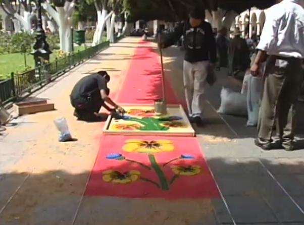 Elaboración de tapete con plantillas